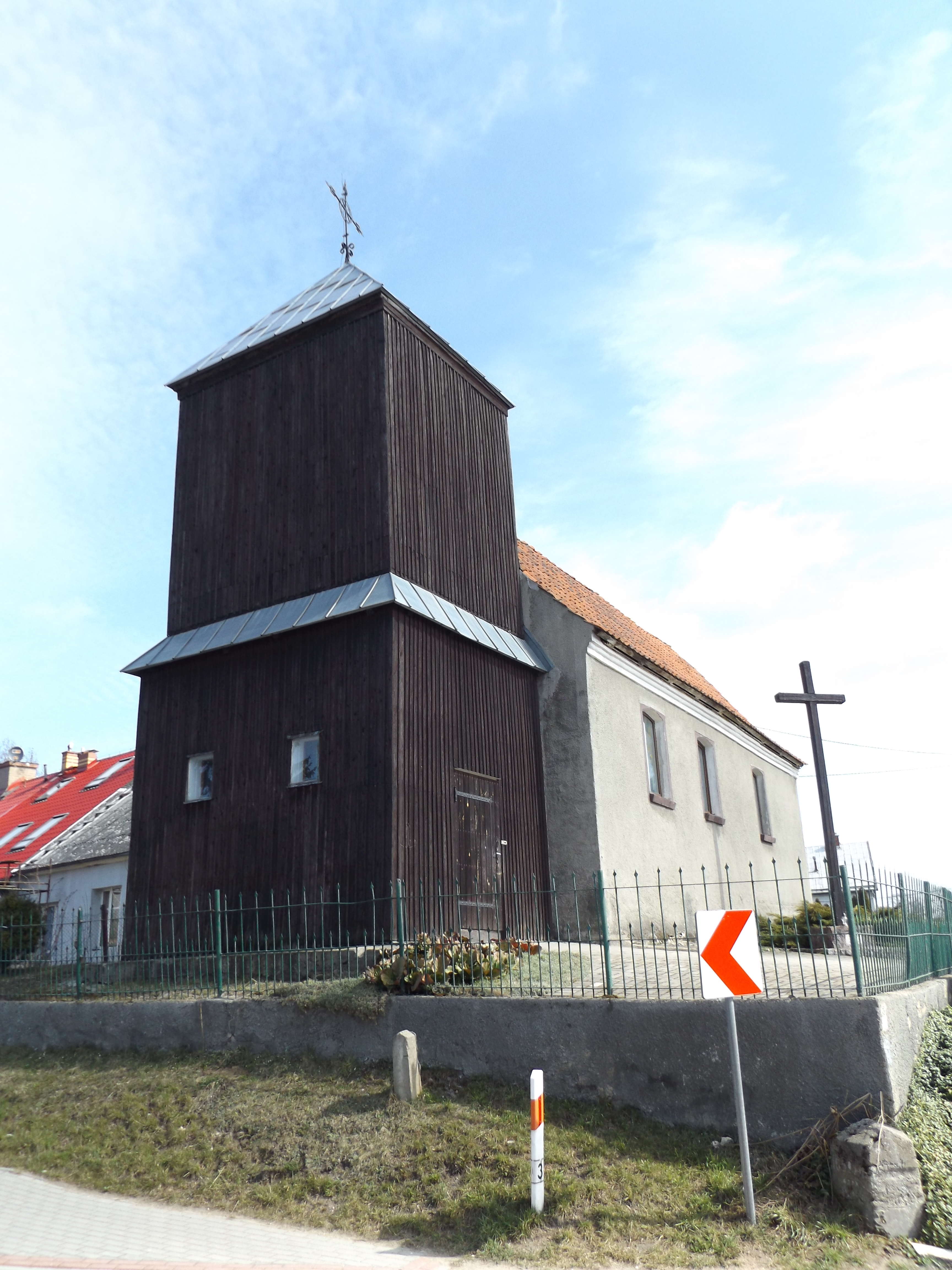 Tuławki - rzymskokatolicki kościół filialny pw. św. Michała Archanioła, 1782, l. 70. XX